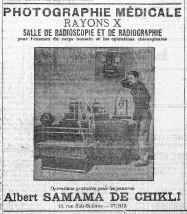 Publicité pour l'atelier de photographie médicale d'Albert Samama-Chikli, parue dans le numéro 3105 du 01.01.1899 de La Dépêche Tunisiennne, Tunis, Tunisie